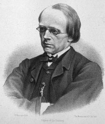 Norsk (bokmål): Halvdan Kjerulf (1815–1868)